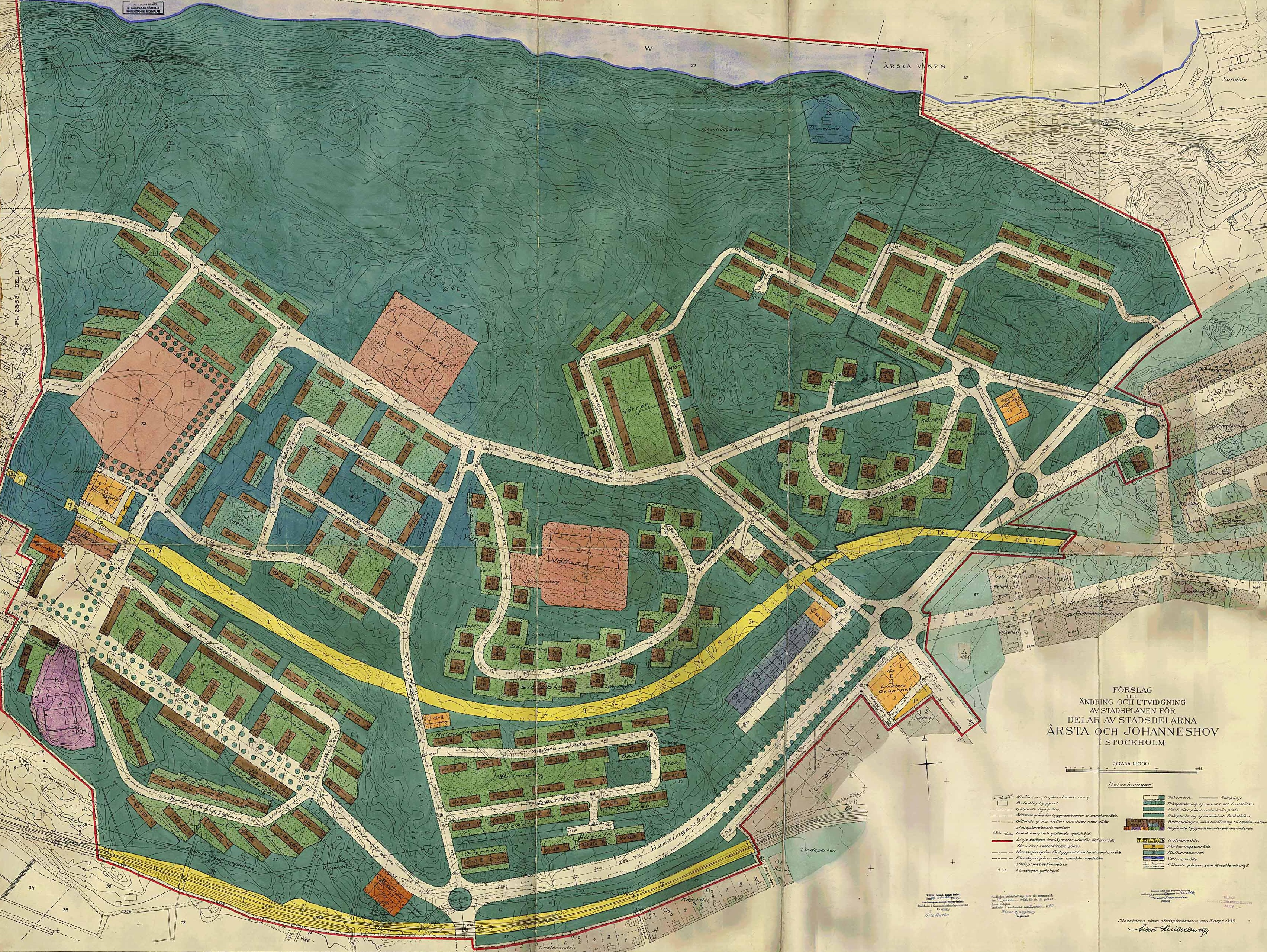 Stadsplan Pl 2353 för del av Årsta